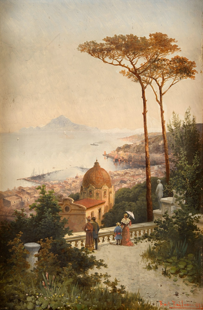 Neapel mit Blick auf Capri.